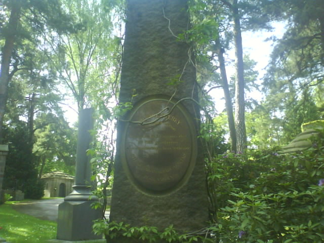 Fredrik Sterkys grav på norra begravningsplatsen.